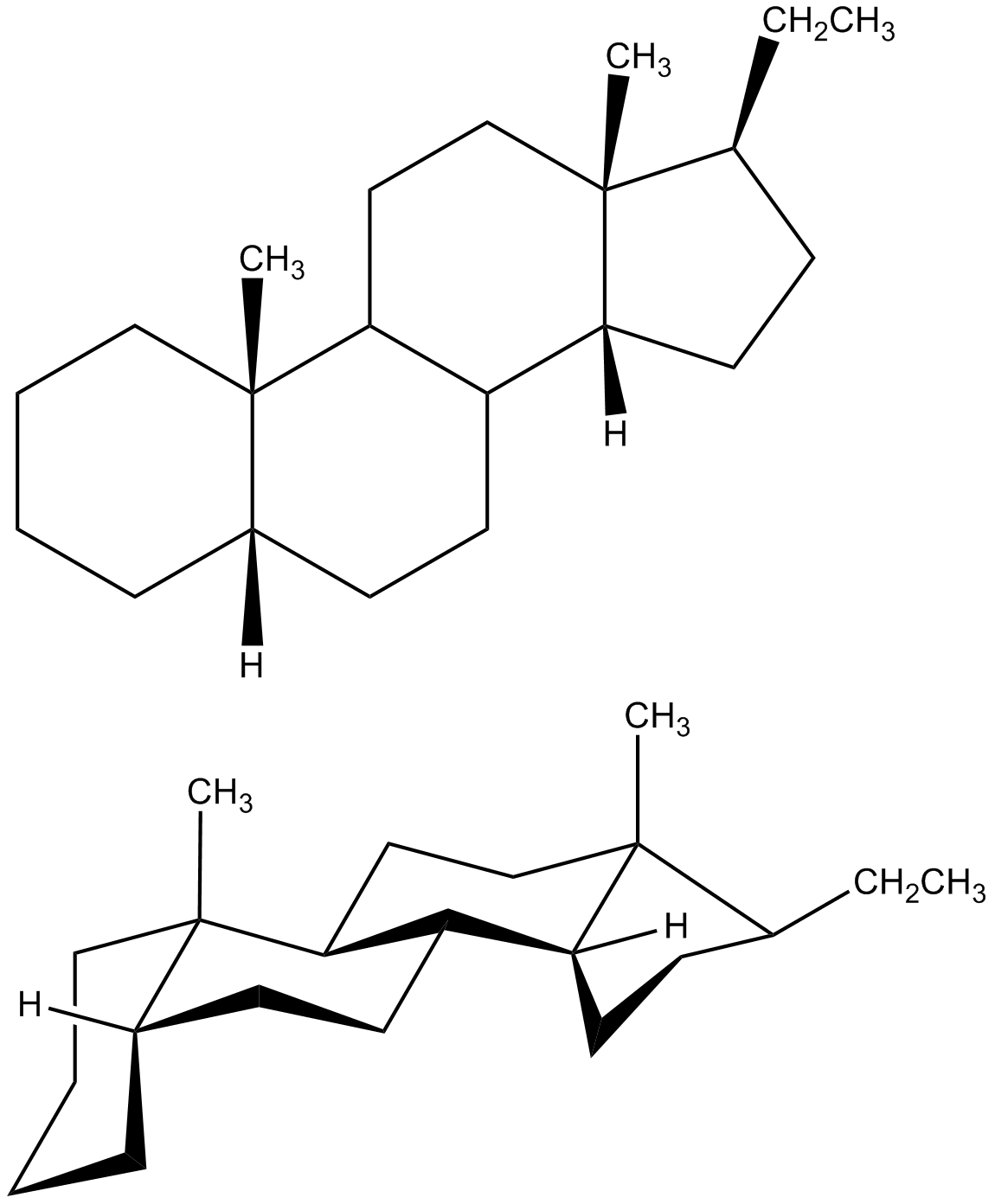 isómero 5b,14b del pregnano